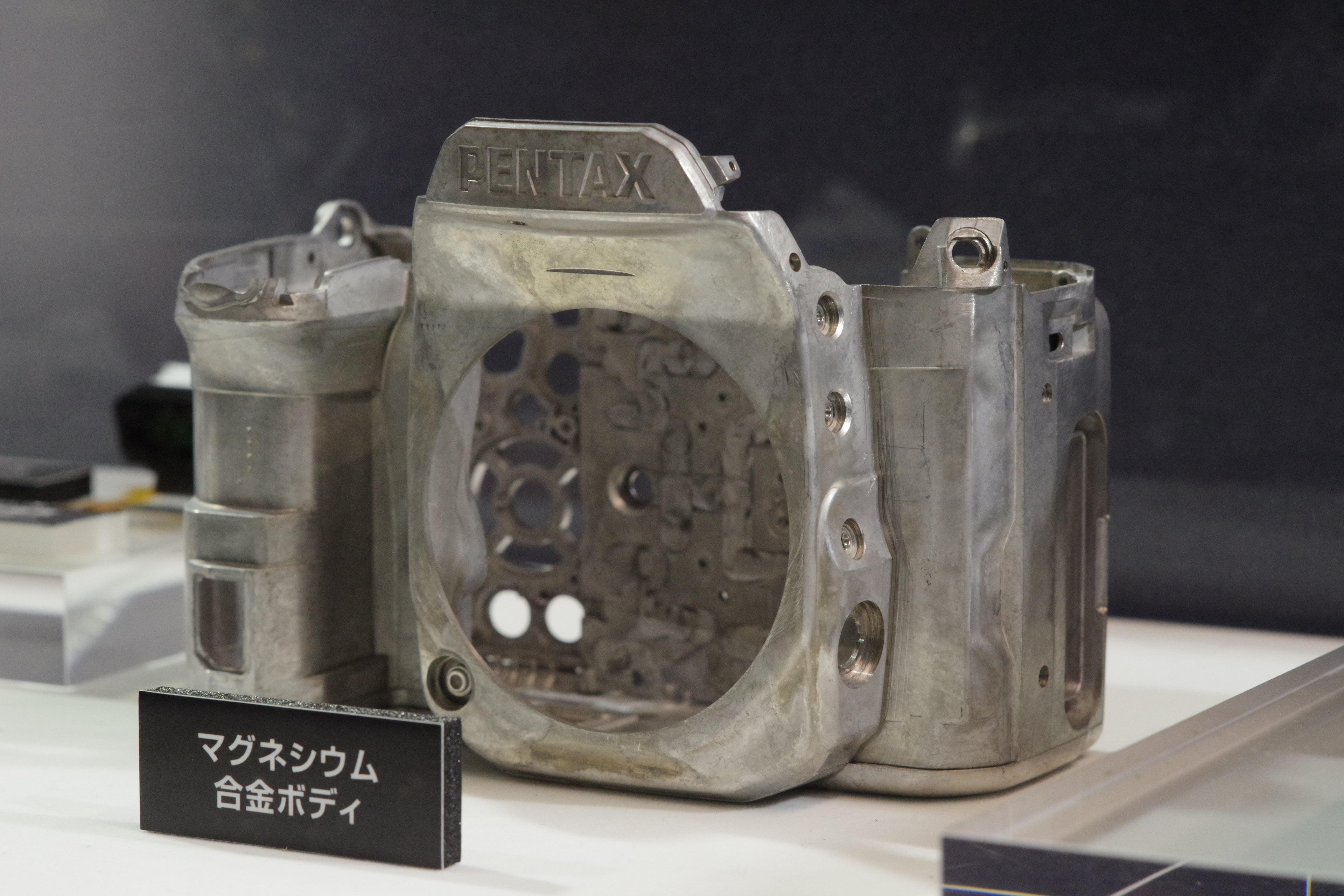 PENTAX K-1に用いられているマグネシウム合金製ボディ。名古屋コンベンションホールで撮影。